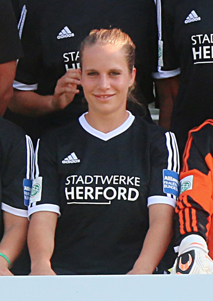 Herforder SV Borussia Friedenstal Team 2014/2015